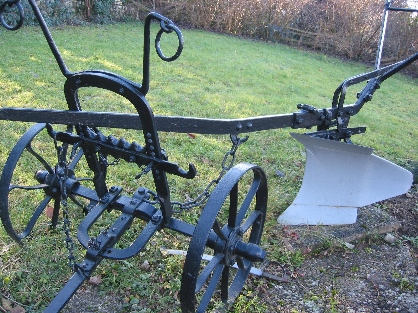 Doppelschar-Kehrpflug für Pferdezug der Firma Eberhardt, Ulm, Baujahr um 1935 (der Pflug ist ererbtes Eigentum RAUPP und war Jahrzehnte in Staffort eingesetzt)